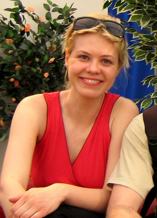 Ewelina Serafin (ur. 26 czerwca 1977 w Opolu) – polska aktorka filmowa i teatralna.